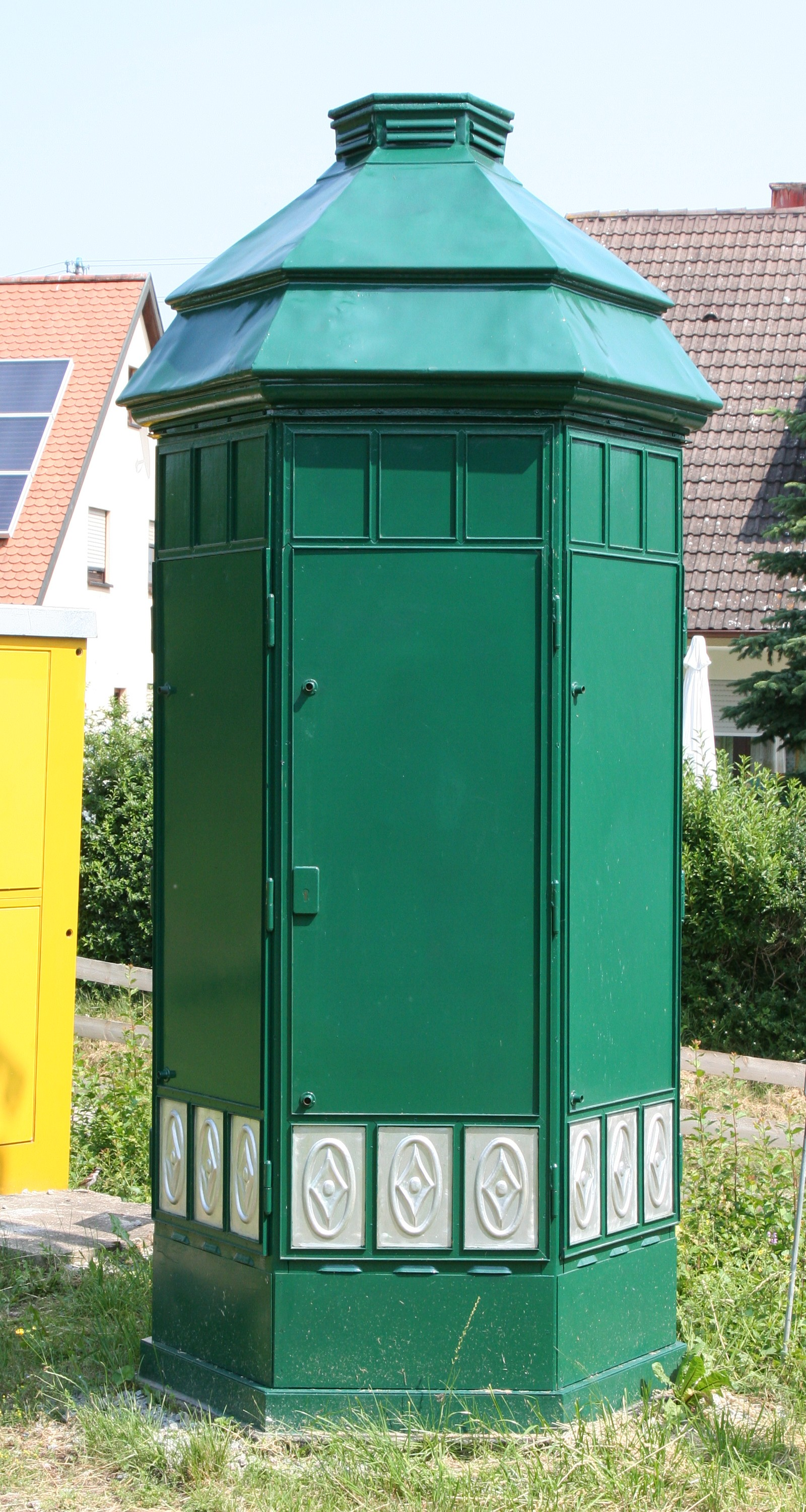 Ein Linienverzweiger (LVz) von 1928, der bis 1994 in Dresden stand. Jetzt im Hohenloher Freilandmuseum Wackershofen